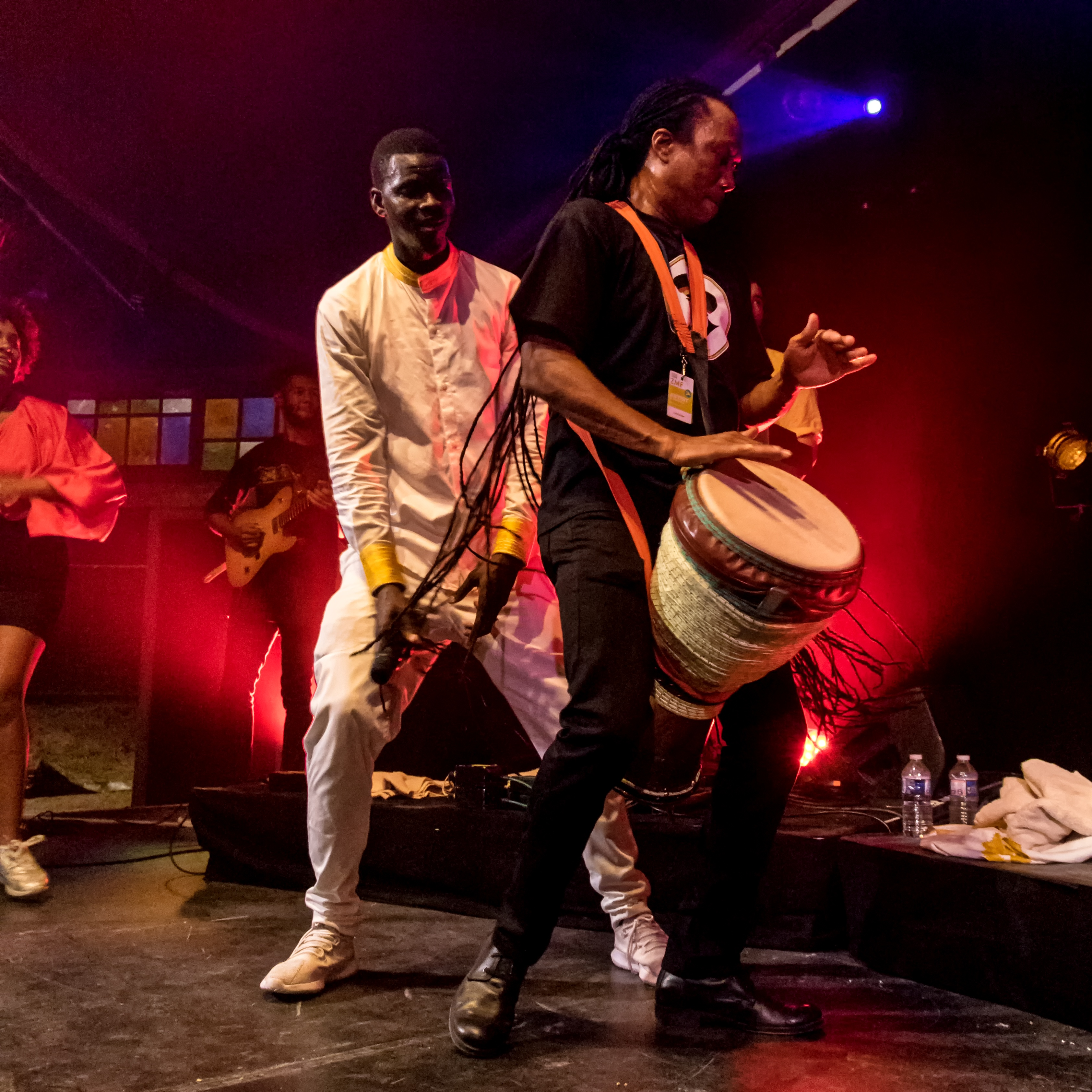 Bilder vom Zelt Musik Festival 2018 in Freiburg im Breisgau Daara J am 29.07.2018 im Spiegelzelt